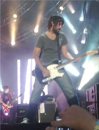 David Otero guitarrista de El canto del loco al concert de Salou de la gira Personas.